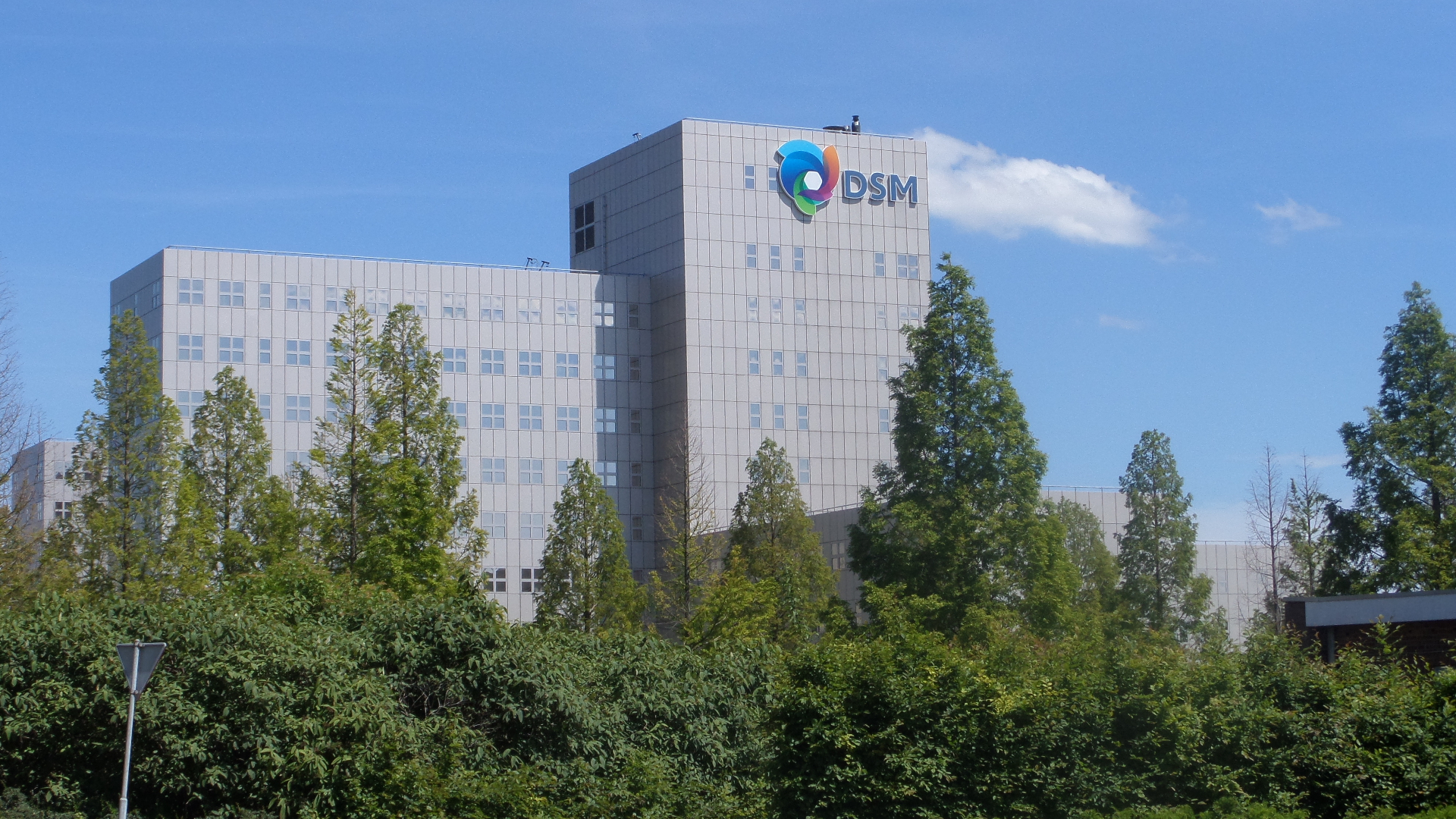 Het DSM-kantoor aan de Poststraat te Sittard